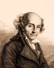 French writer and poet Pierre-Louis Ginguené (1748-1816)